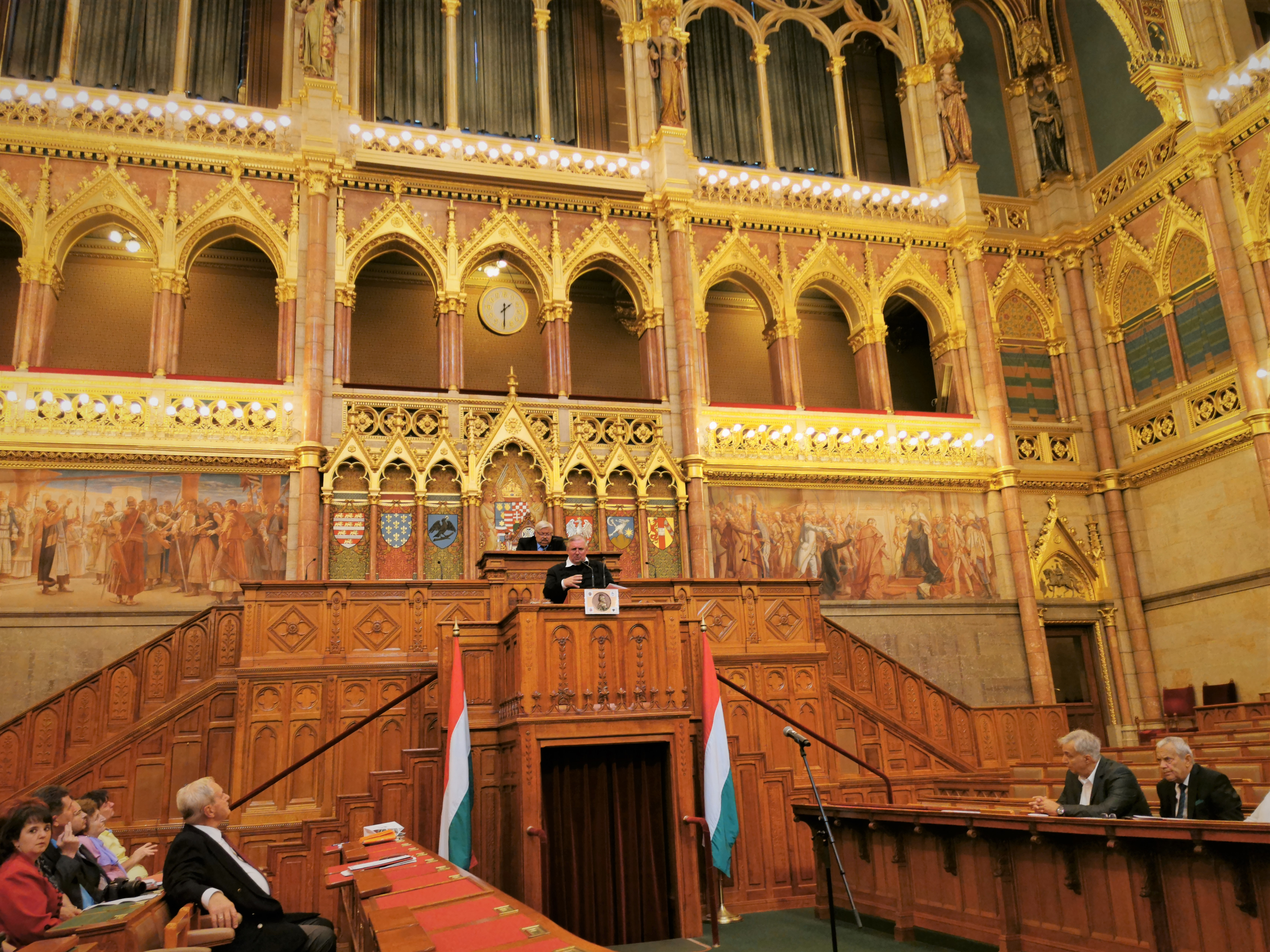 Harangozó Imre (néprajzkutató)ː A veszedelemtől óvó asztal...Rákóczi és a ruszinok. Szabadságeszmények Közép-Európában - Rákóczitól a Pesti Srácokig. Konferencia, az Országház, Felsőházi ülésterem. 2019 szeptember 18-án.